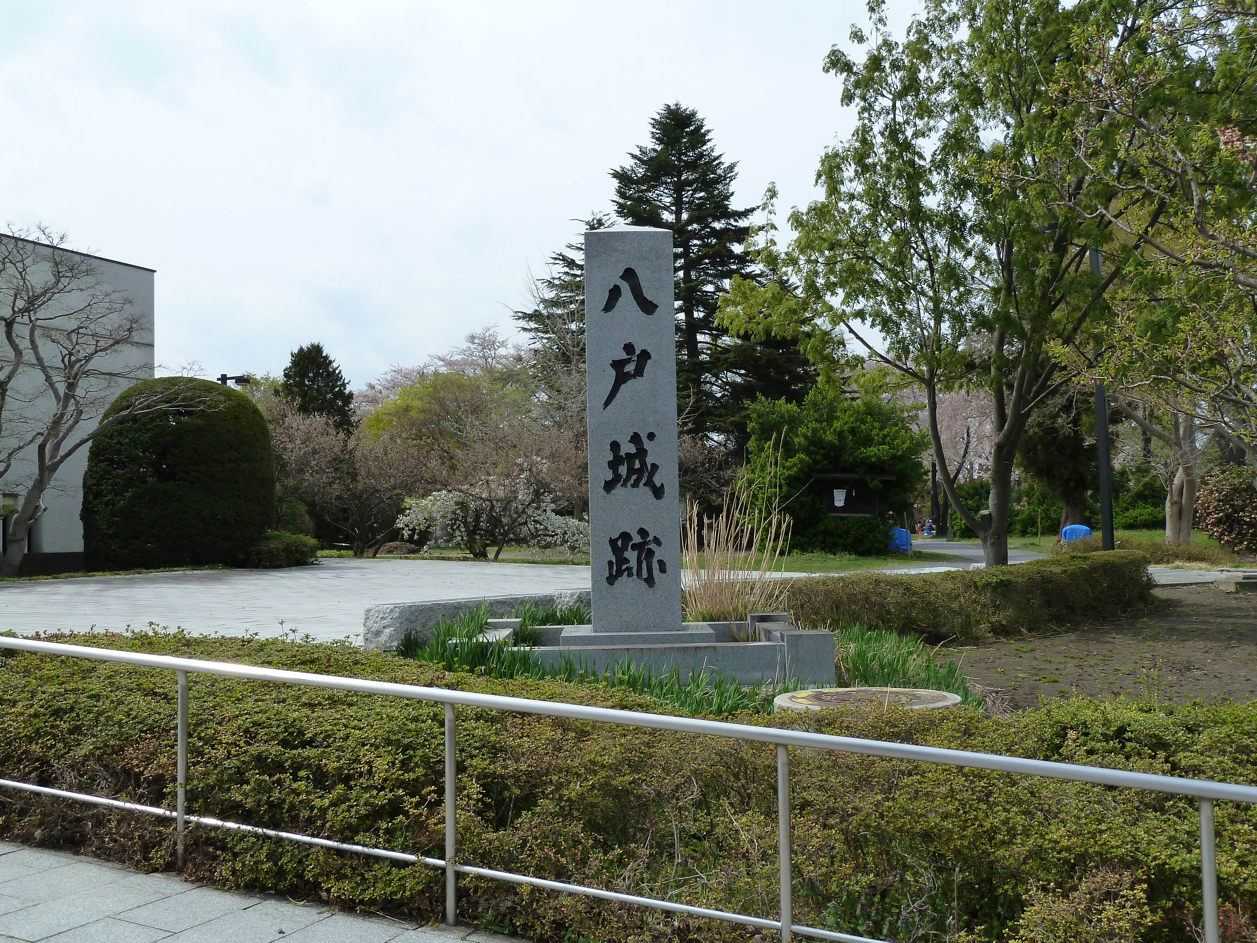 八戸城跡にある石碑